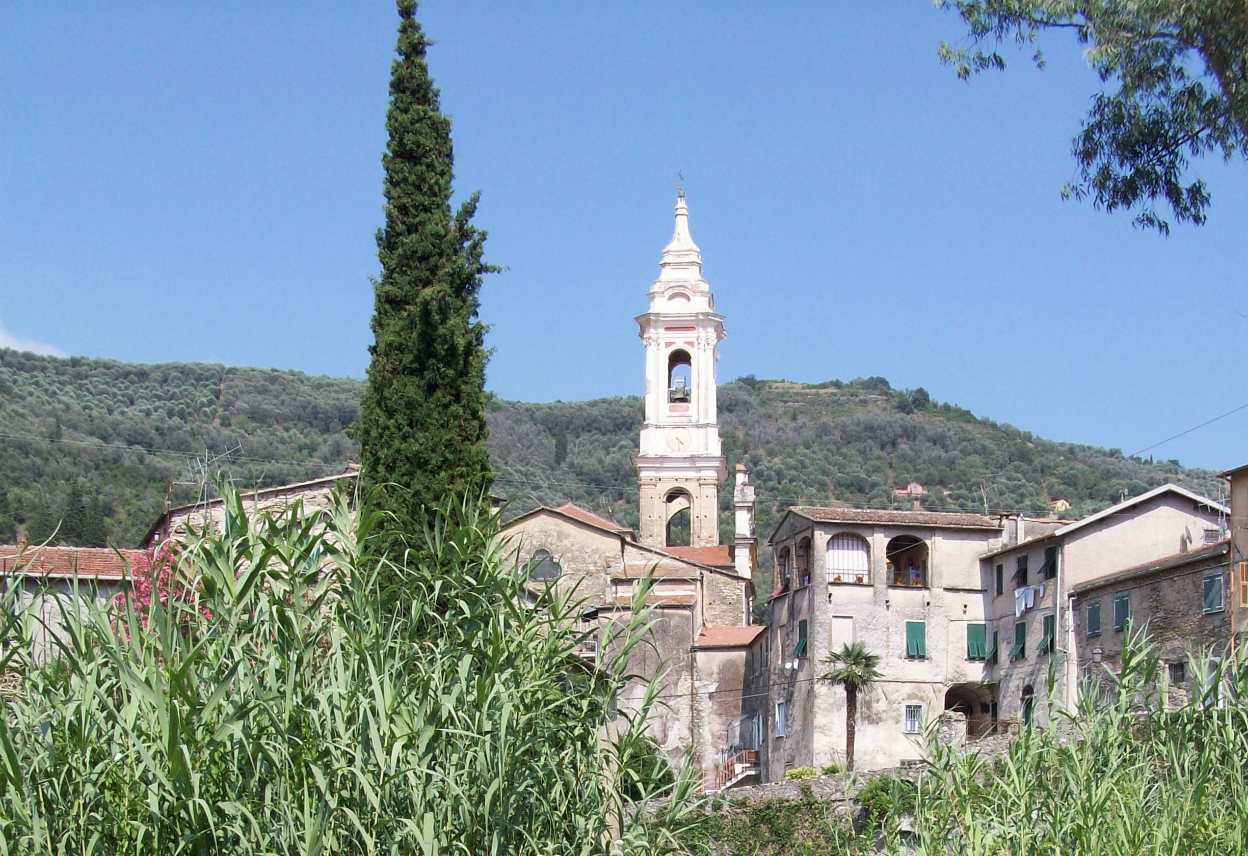 Blick auf Kirche von Docedo vom Bachufer hinter der Altstadt